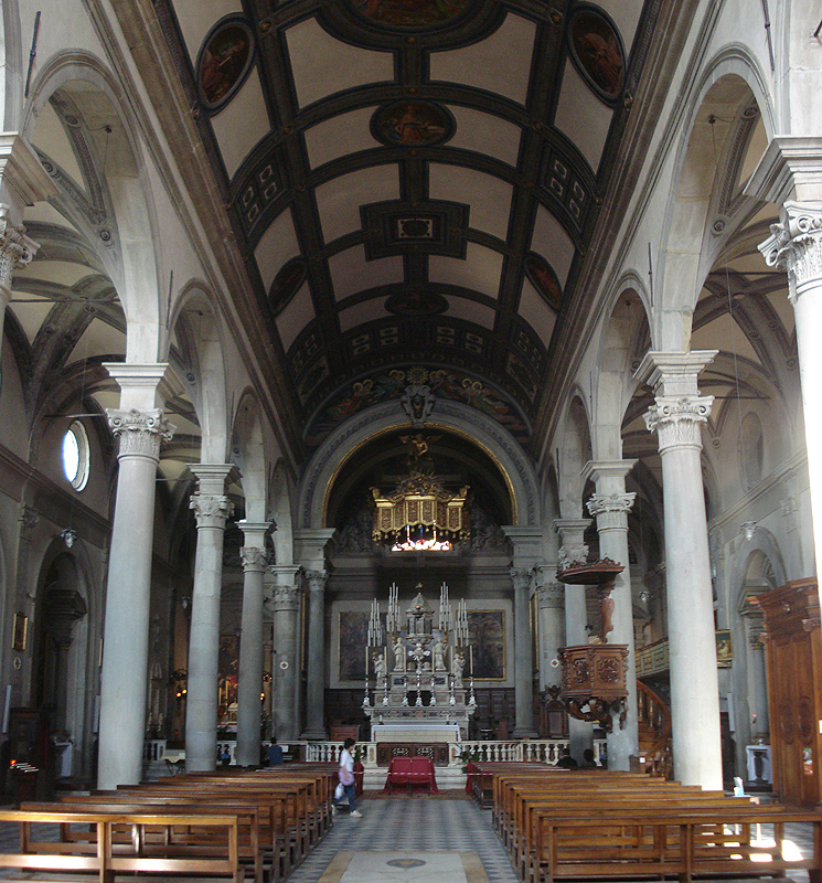 Interior da Catedral de Cortona